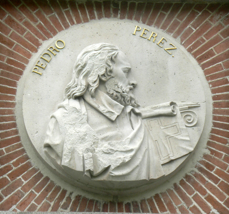 El arquitecto español Pedro Pérez (conocido por Petrus Petri) fallecido en 1291, trabajó en las obras de la Catedral de Toledo. Medallón incrustado en la fachada del Museo del Prado, Madrid.